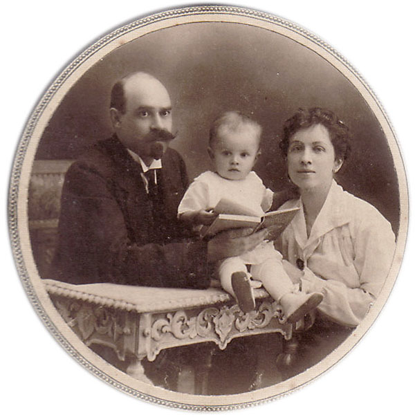 Аполлон Николаевич Кругликов (29 июля 1883, Красноярский уезд (Енисейская губерния) — 1919, РСФСР) — управляющий делами Директории, в Комиссии по организации власти на Уфимском государственном совещании (1918).